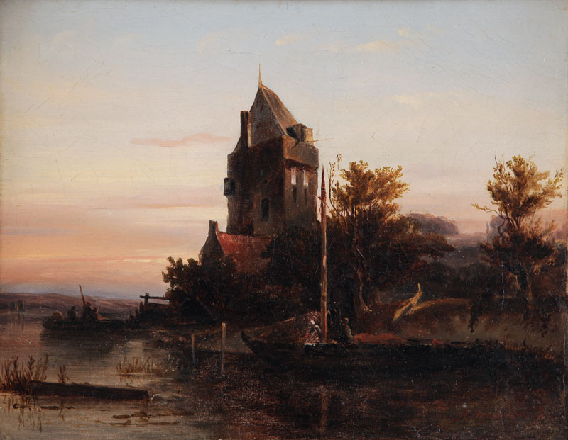 Апалінарый Гараўскі "Замак"